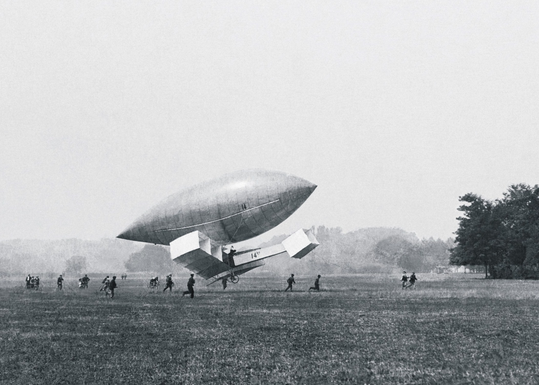 Teste do "14-bis" de Alberto Santos Dumont no campo de Bagatelle (Paris, França) em julho de 1906.